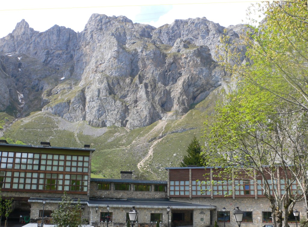 Picos de Europa at Fuente De